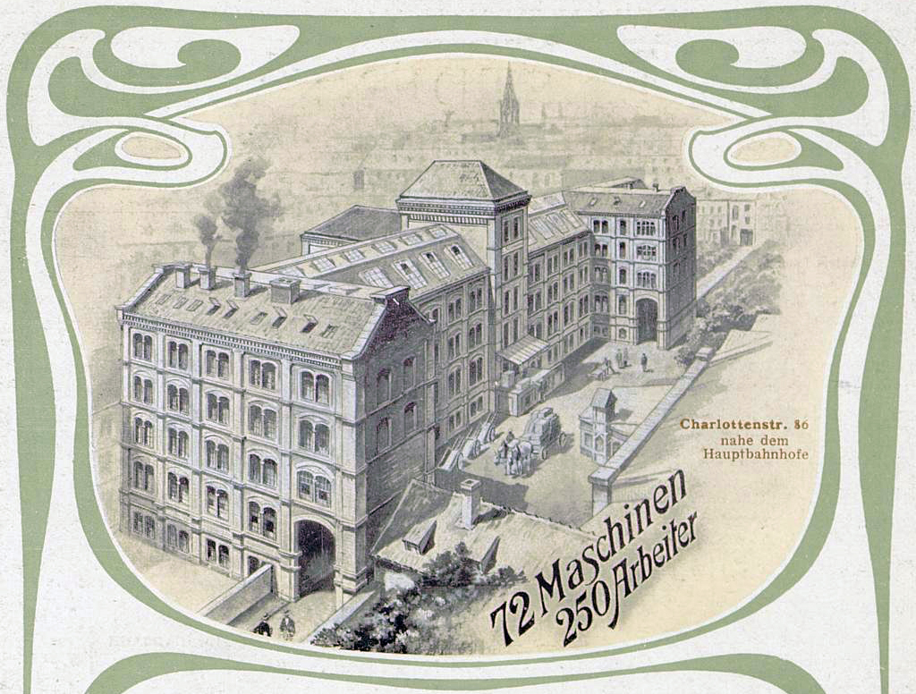 L. Schwann, Buch- und Stein-Druckerei, Charlottenstraße 86, Anzeige in Adressbuch Düsseldorf 1902, laut Adressbuch der Stadt Düsseldorf von 1940 lautete die Anschrift Charlottenstraße 80 bis 86